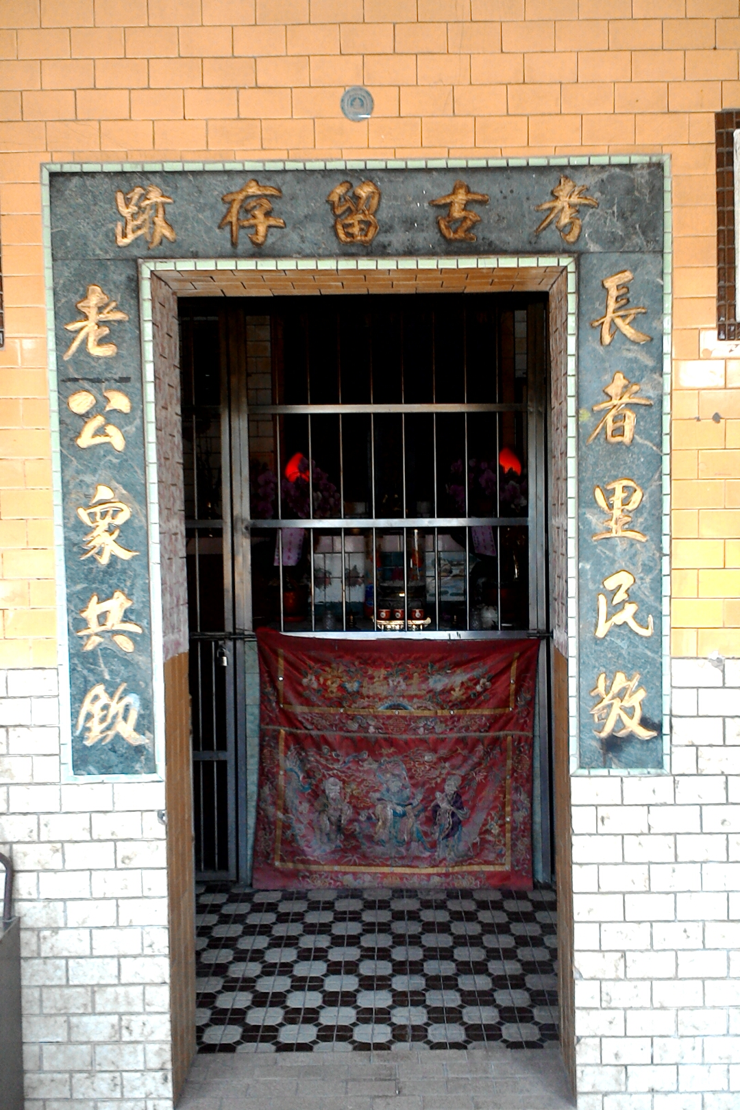 老公祠入口與對聯,台北市內湖區金龍次分區秀湖里